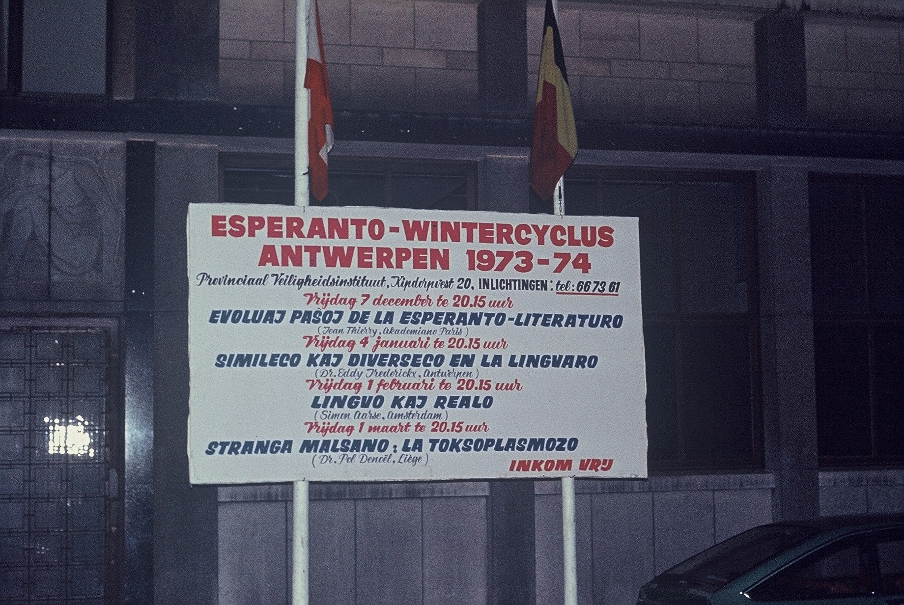 Afiŝo anoncanta la Vintran Ciklon, sur la stacidoma placo en Antverpeno.